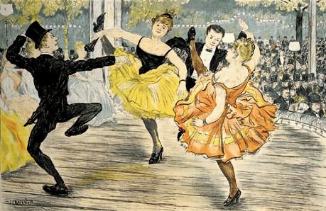 Jean-François Raffaelli (1850-1924), A Quadrilha naturalista nos embaixadores (1886)